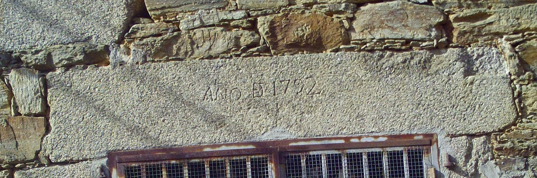 Antiguas viviendas